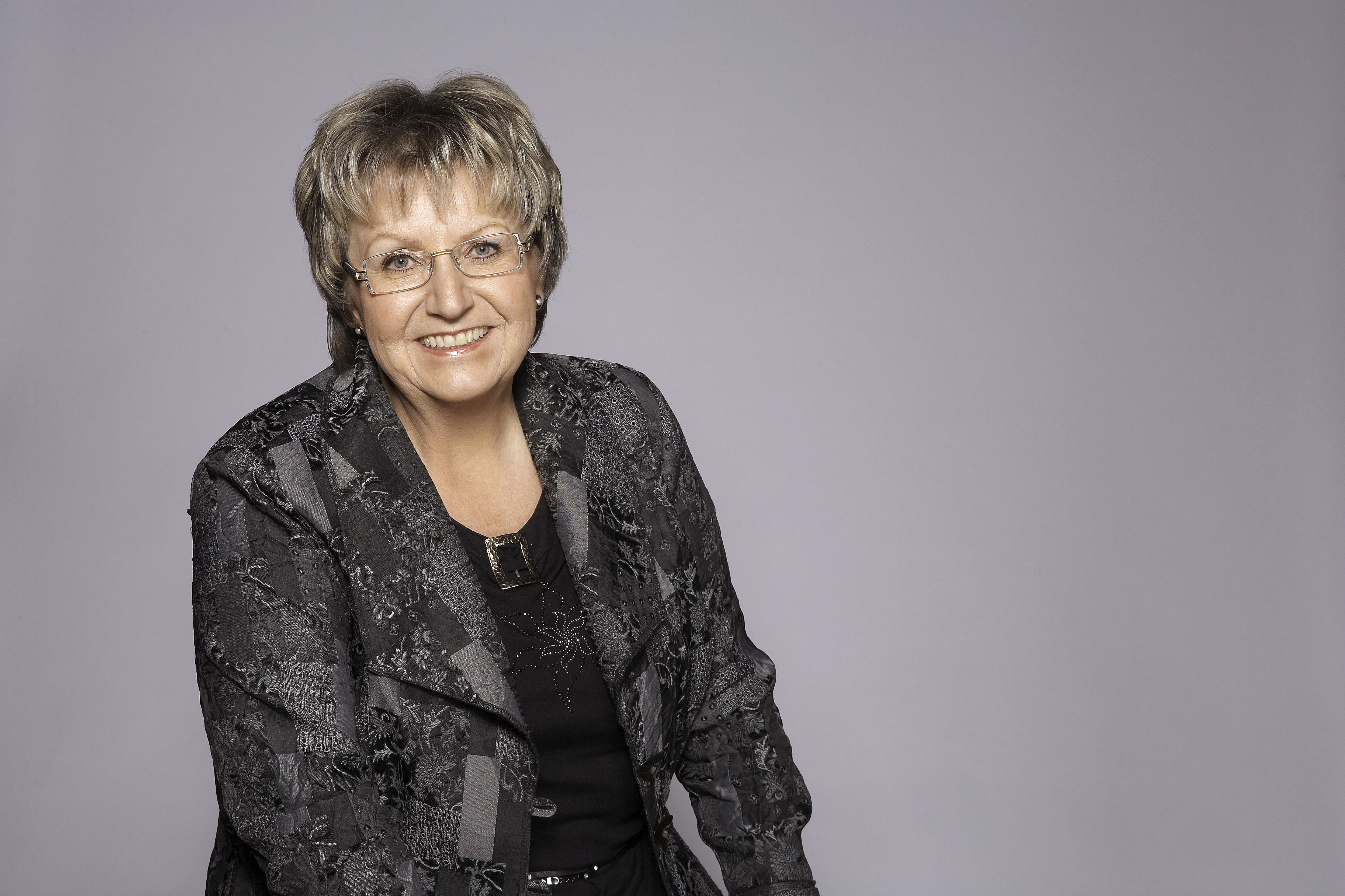 Vigdis Karen Giltun valgkampbilder for Stortingsvalgkampen 2009